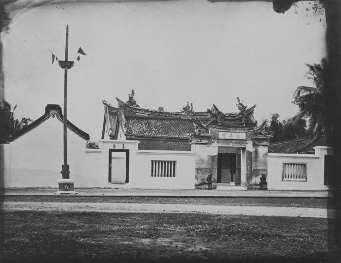 foto. Chinese tempel